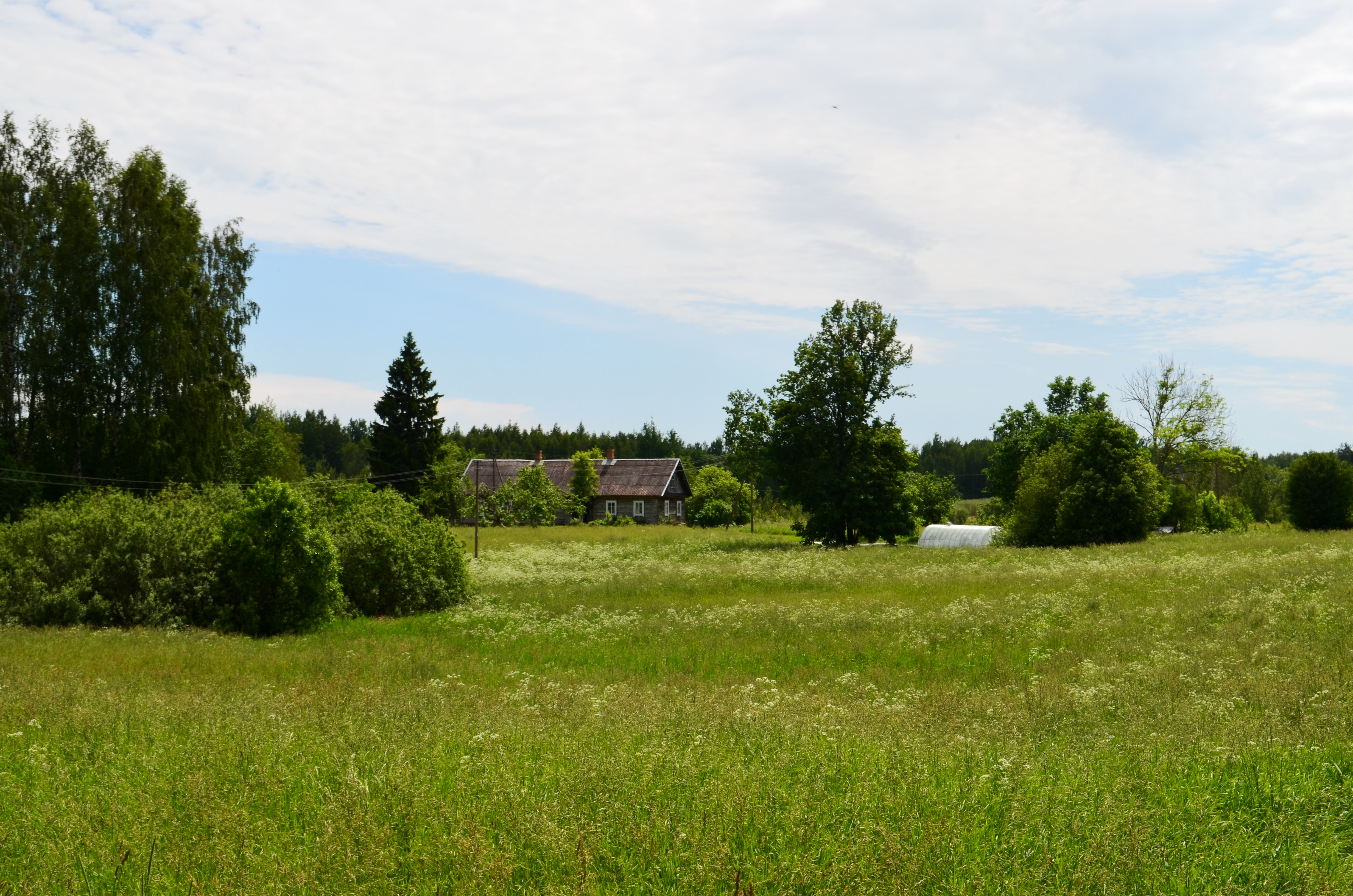 Paluodė, Zarasų r.